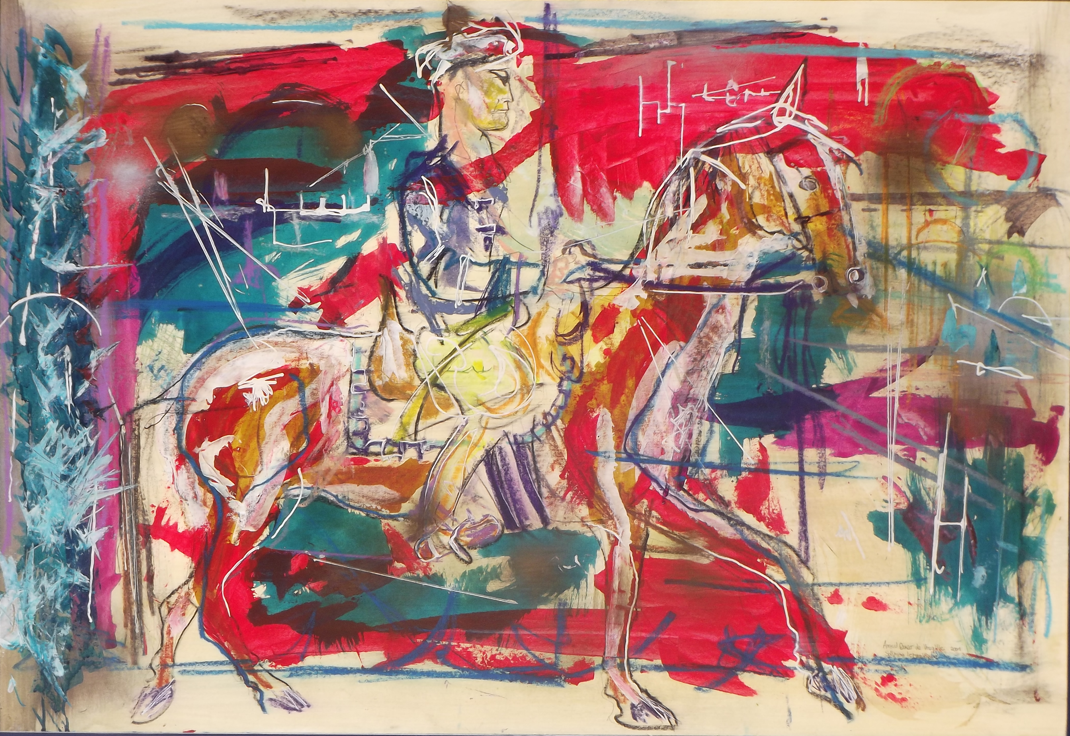 Soliman le Magnifique, 2001, 120 x 80 cm, Acrylique et pastel